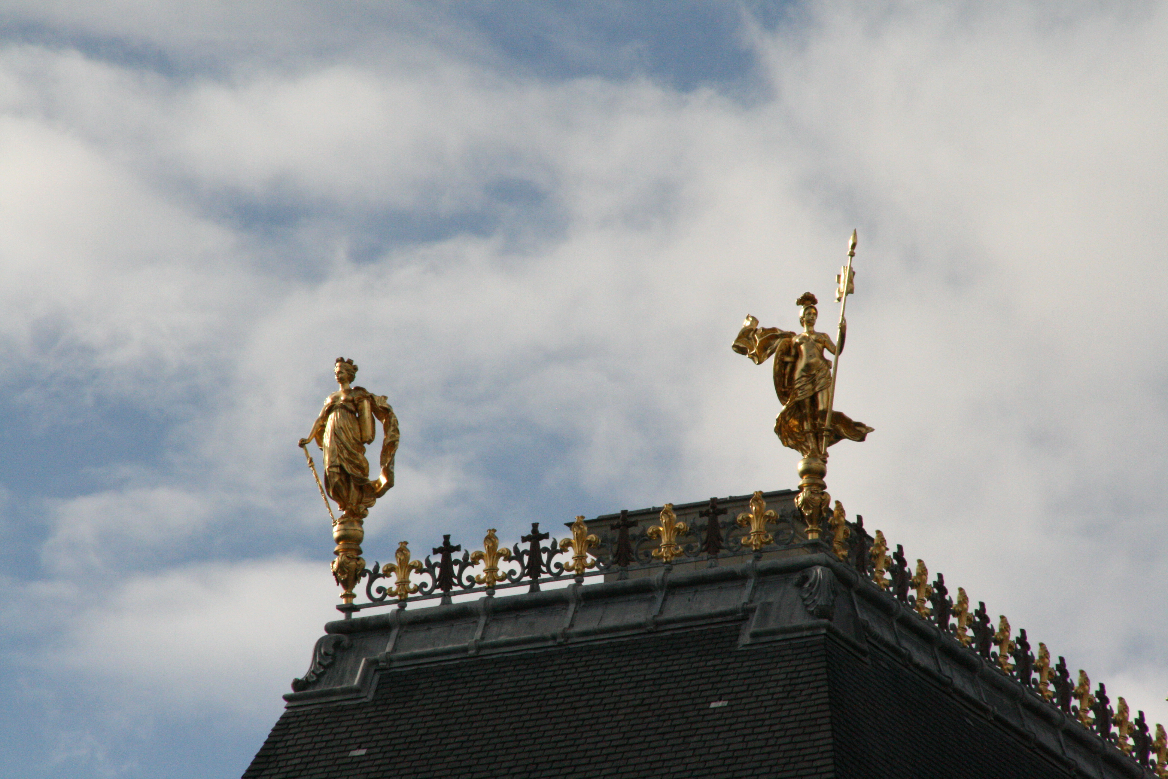 Statues en haut du toit côté ouest de la façade du Parlement de Bretagne, à Rennes (Ille-et-Vilaine, Bretagne), vues depuis la place du Parlement. De gauche à droite : La Loi et La Force.